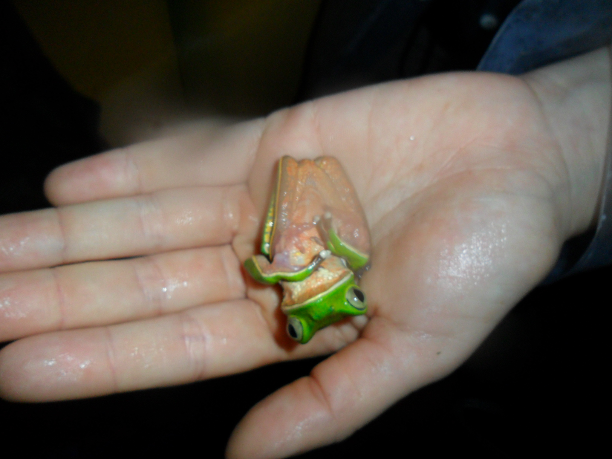 Comportamento anti-predatório